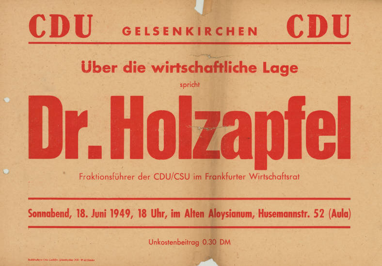 CDU Gelsenkirchen CDU Über die wirtschaftliche Lage spricht Dr. Holzapfel Fraktionsführer der CDU/CSU im Frankfurter Wirtschaftsrat ...Plakatart:AnkündigungsplakatDrucker_Druckart_Druckort:Buchdruckerei Otto Lashöfer, Gelsenkirchen Nr-W-6/7/01484Objekt-Signatur:10-031 : 186Bestand:CDU-Plakate (10-031)GliederungBestand10-18:CDU-Plakate (10-031) » Ankündigungsplakate » 1945 - 1949Lizenz:KAS/ACDP 10-031 : 186 CC-BY-SA 3.0 DE